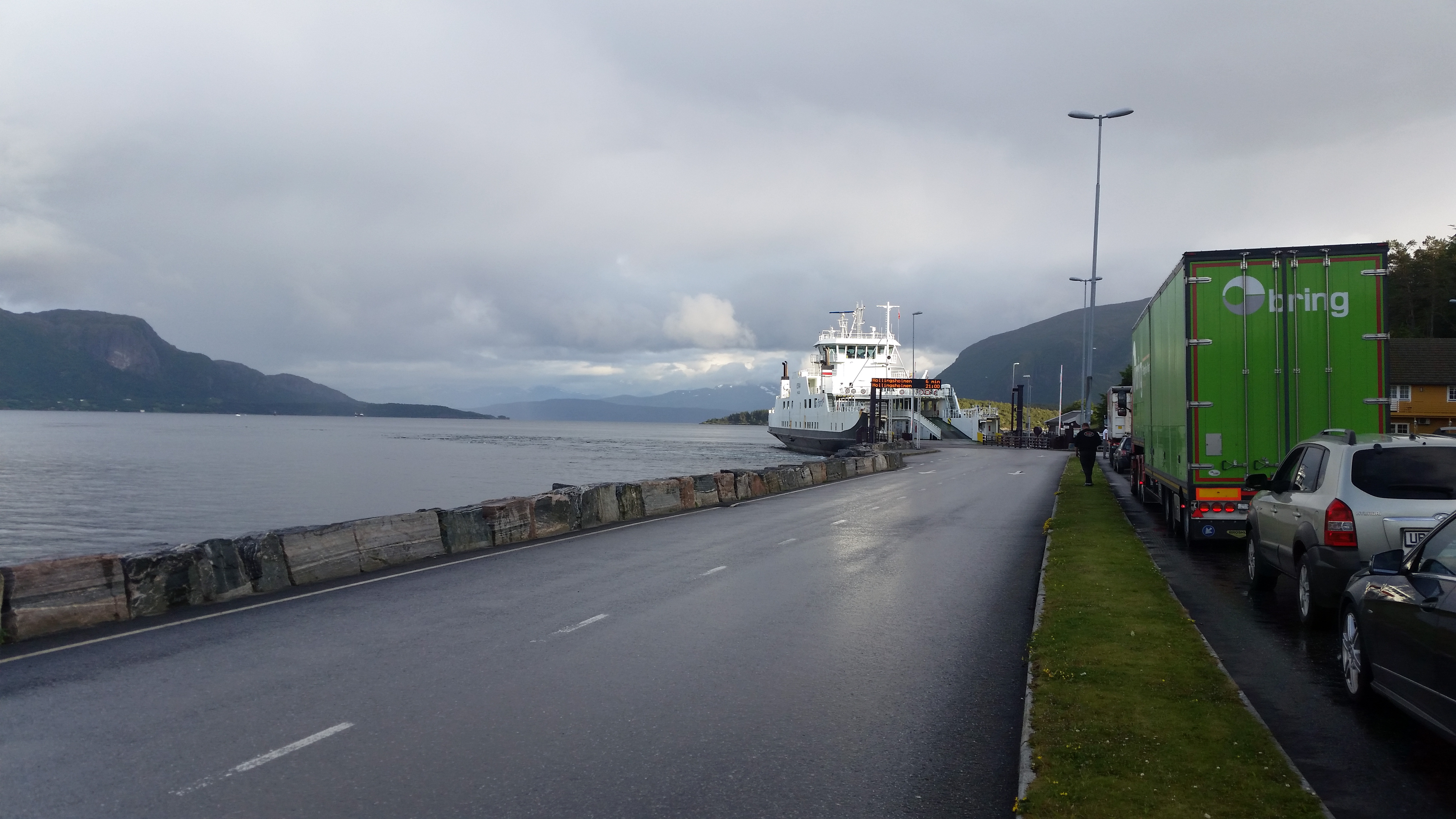 Aukra Fergeleie, Aukra, Gossa, Aukra kommune, Møre og Romsdal